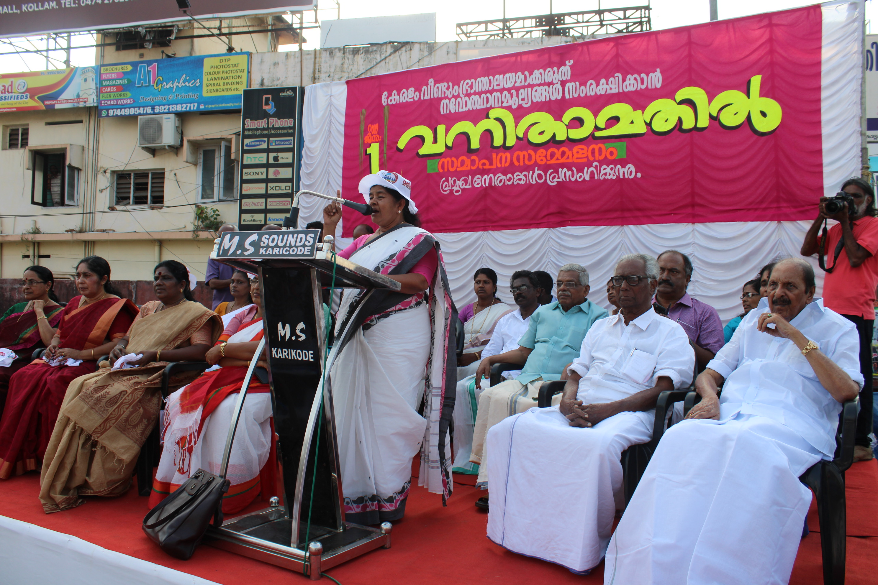 വനിതാ മതില്‍ - കൊല്ലം